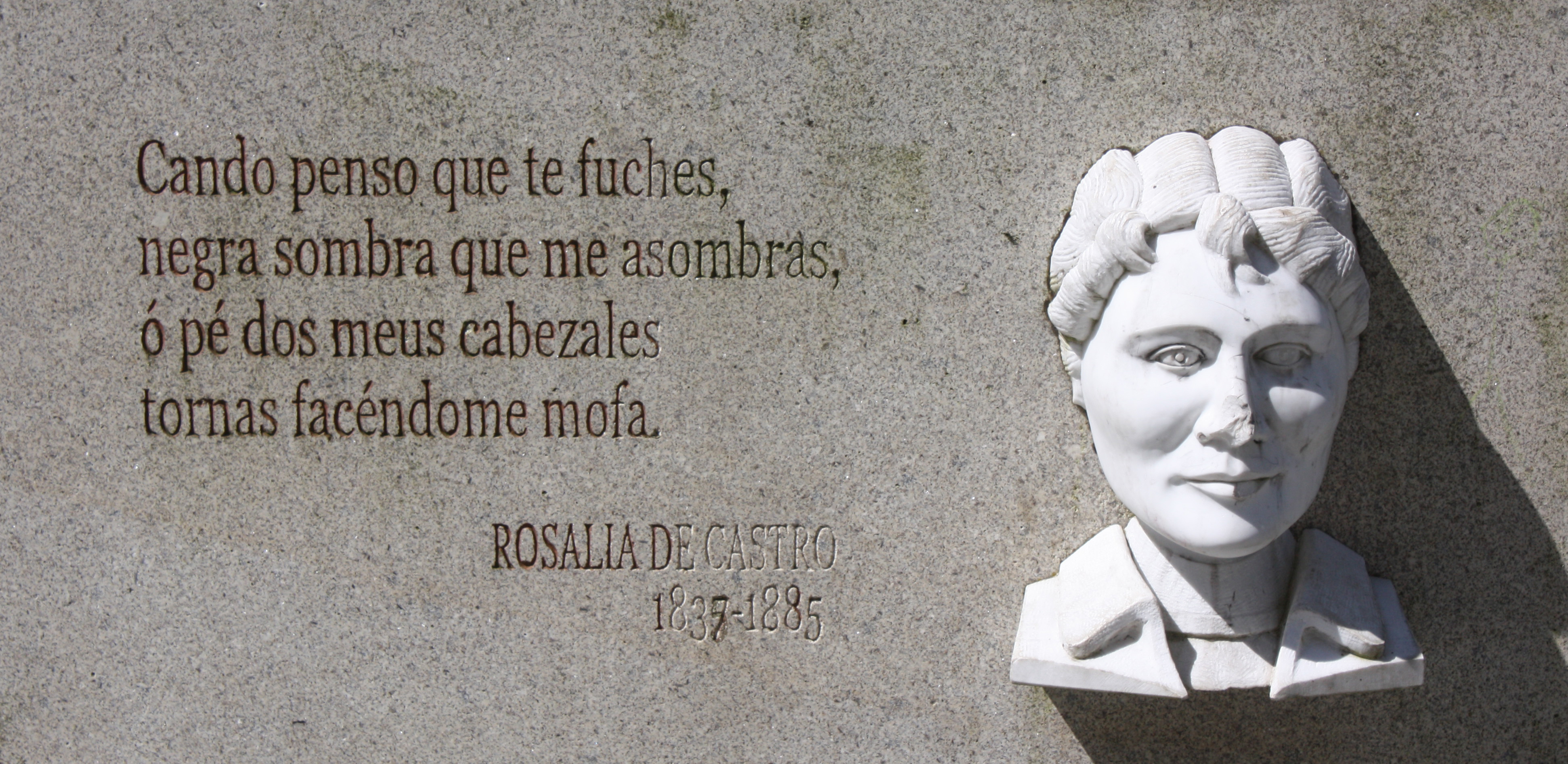 Placa na honra de Rosalía de Castro, na praza Maior de Lugo